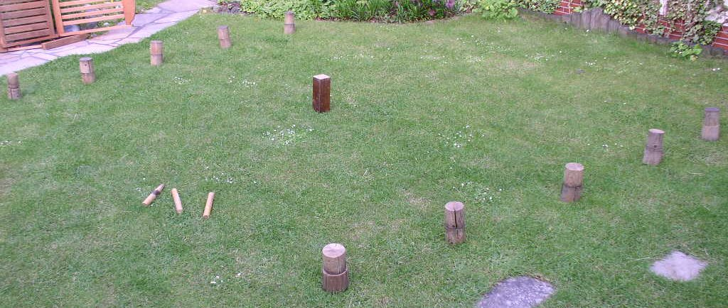 Kubb, Lizenz: GFDL, selbstfotographiert